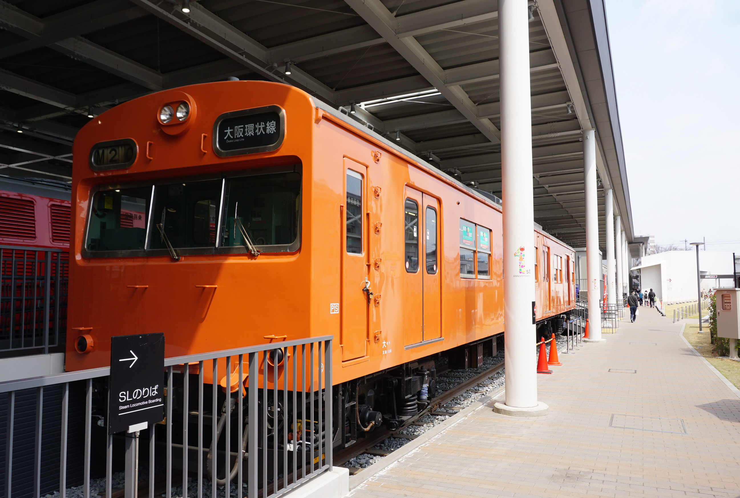 京都鉄道博物館に保存されたクハ103-1 Sony ILCE-6000